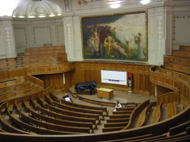 Amphithéatre Richelieu à la SorbonneRichelieu Lecture Hall in the Sorbonne